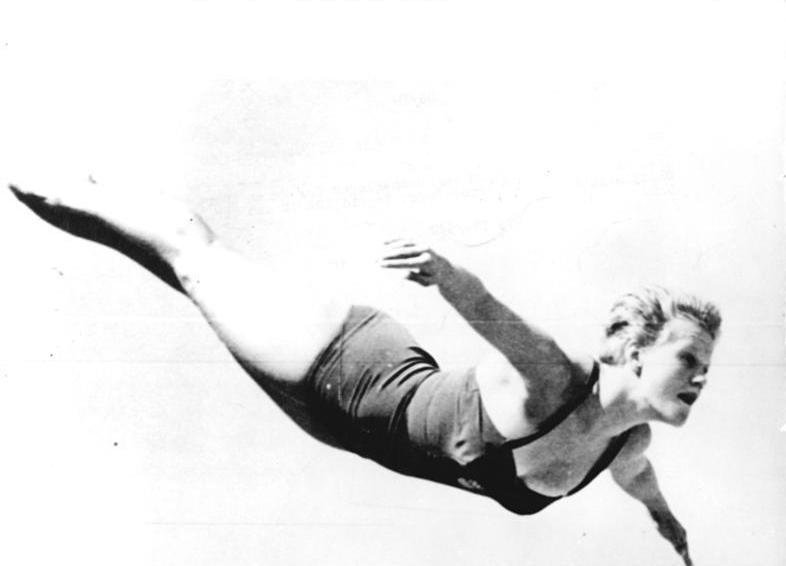 Zentralbild-AP Sd-Fr. 30.8.1960 XVII. Olympische Sommerspiele 1960 in Rom. (Kunstspringen Damen) Nach den ersten Sprüngen im Turmspringen der Damen führt Olympiasiegerin im Kunstspringen Ingrid Krämer aus der DDR.